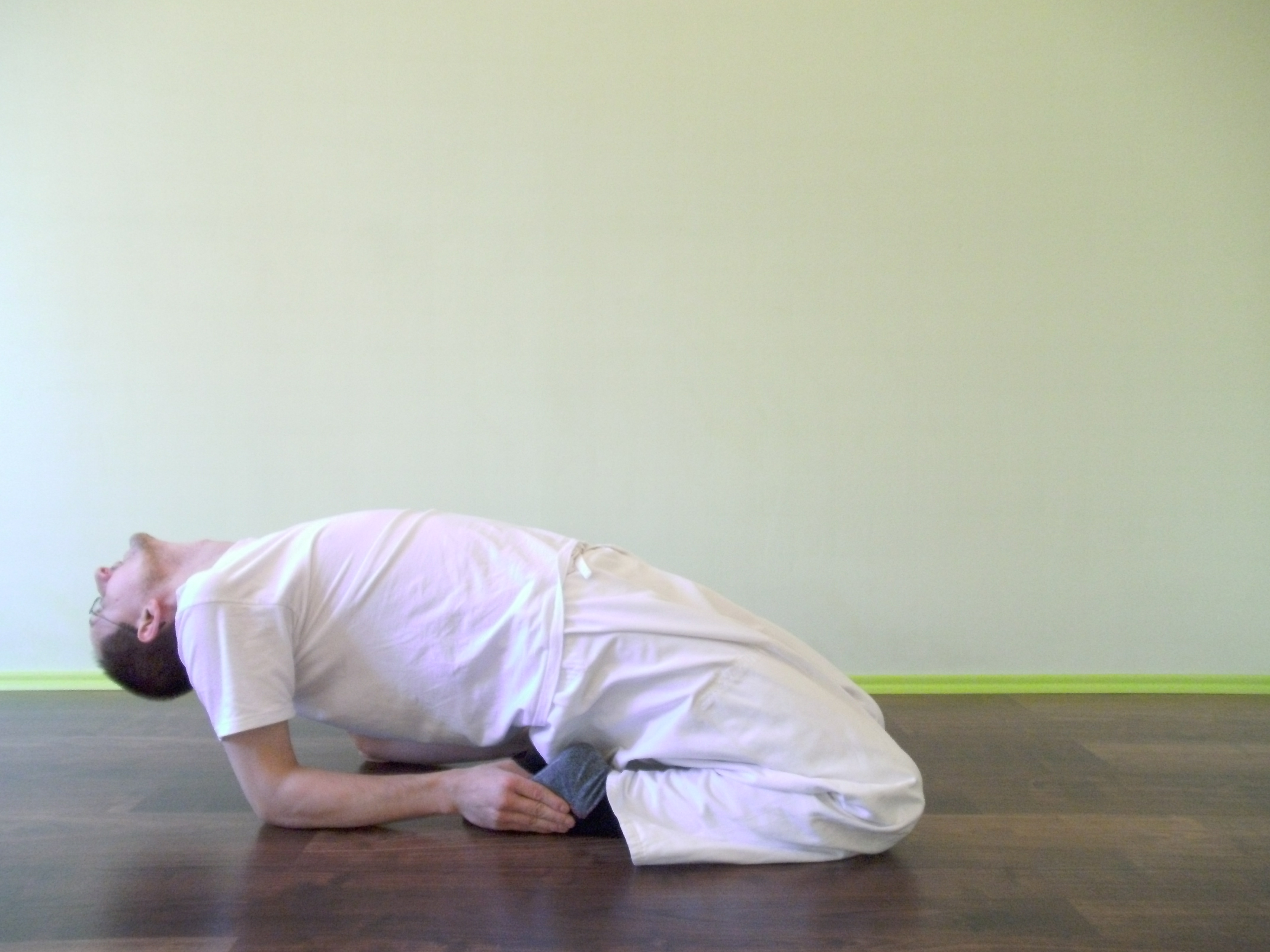 Makko Ho Übung für Magen- und Milz-Meridian